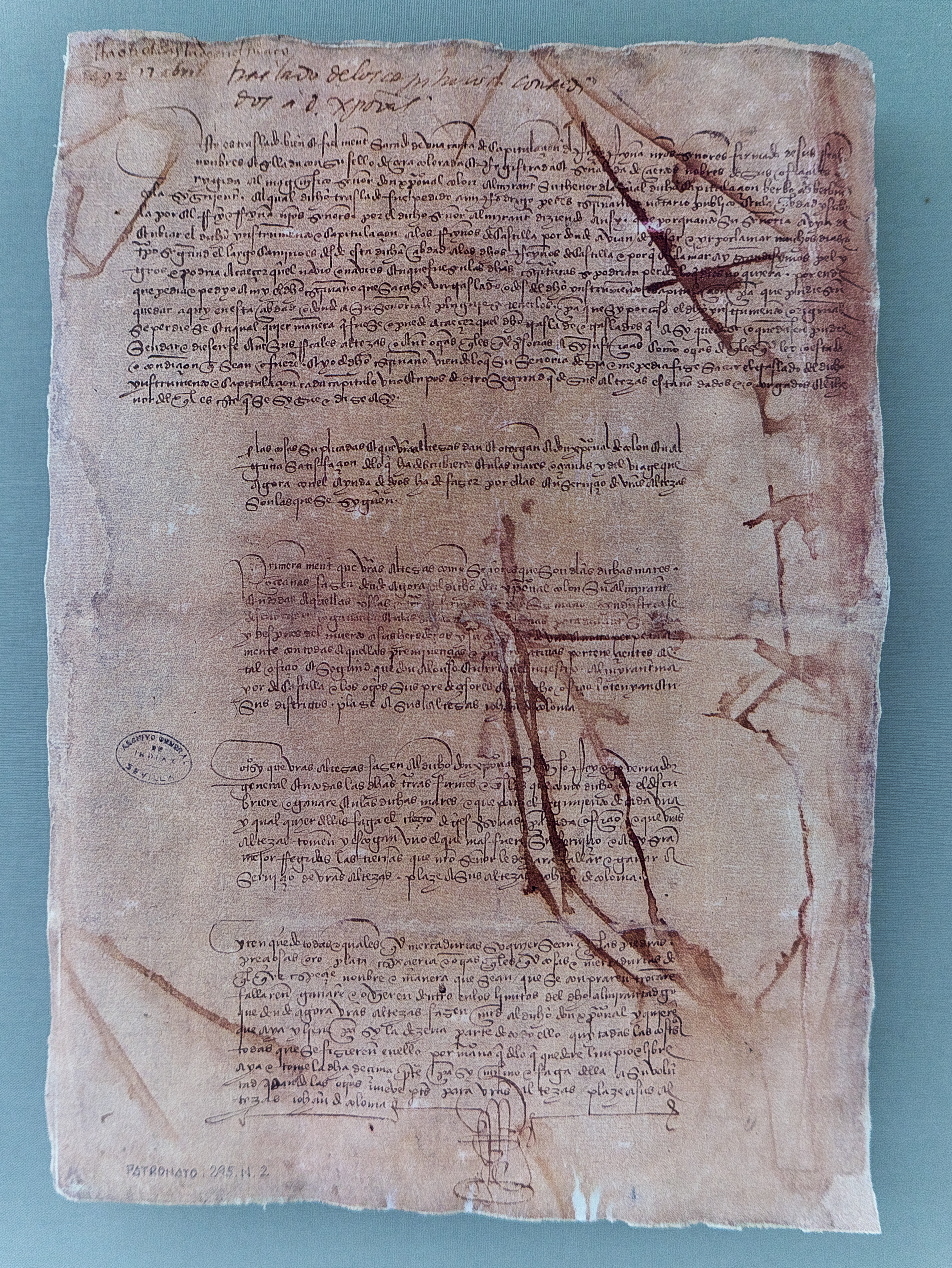 Patronato 295, num. 2 Capitulaciones acordadas por los Reyes Católicos y Cristóbal Colón. Santa Fé, 14 de Abril de 1942.